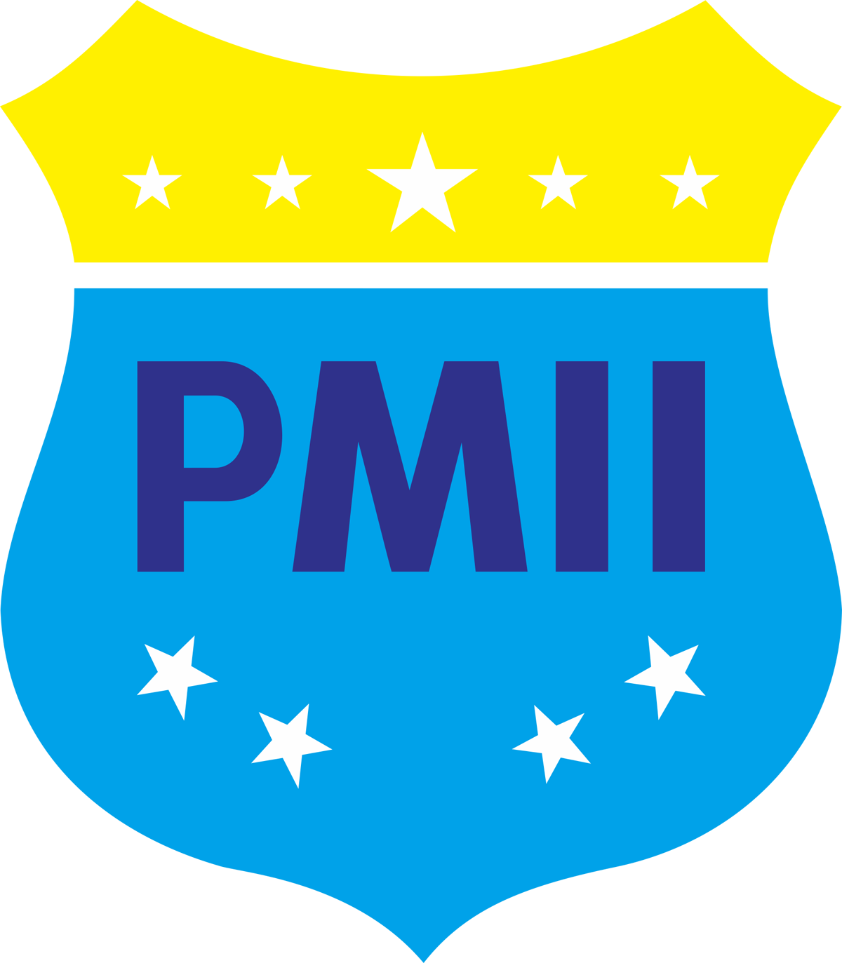 Lambang/Logo Organisasi Nahdlatul Ulama, Pergerakan Mahasiswa Islam Indonesia